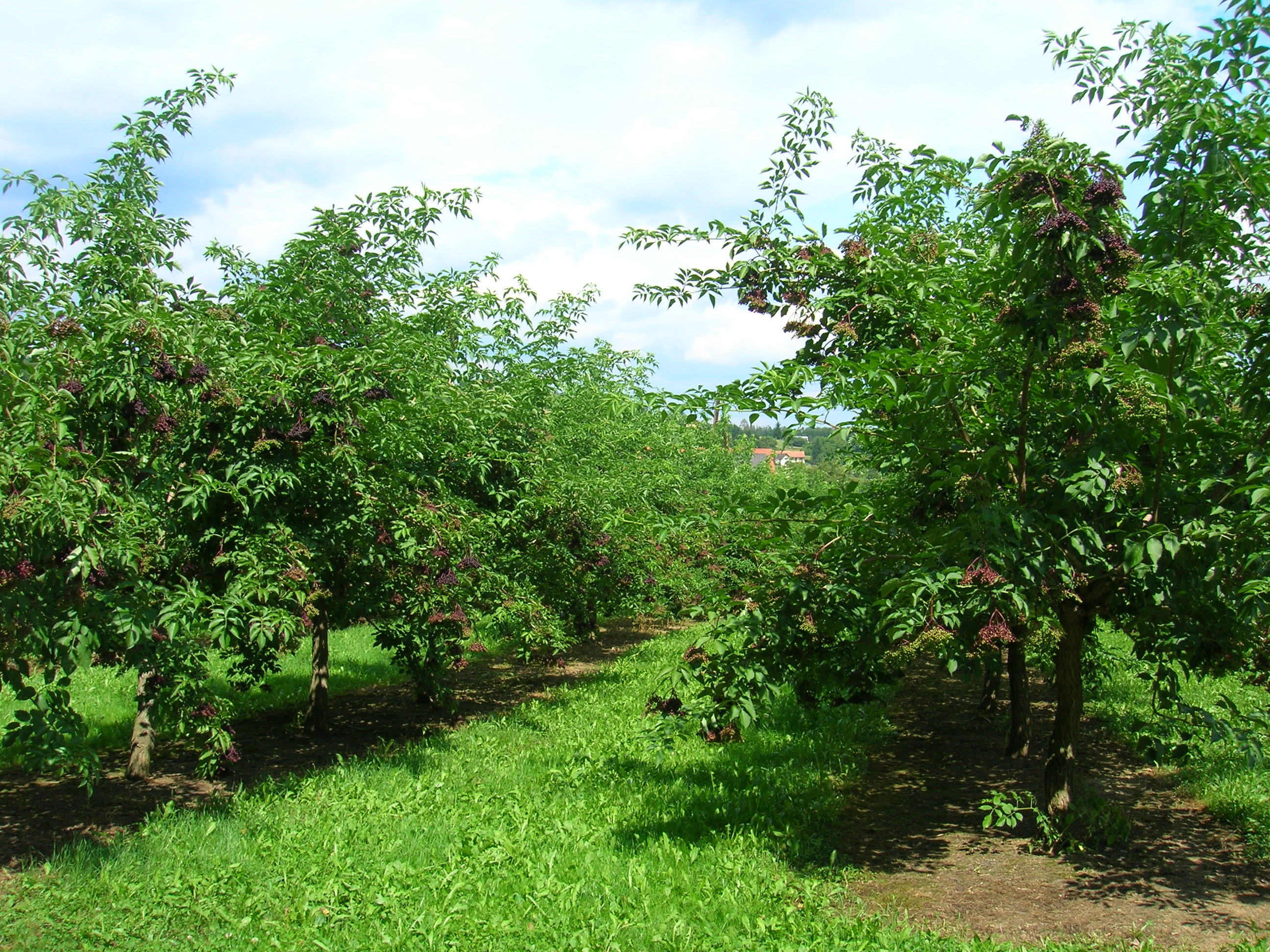 de: Holunderkultur in der Nähe von Gleisdorf in der Oststeiermark en: cultivation of elderberry in Eastern Styria